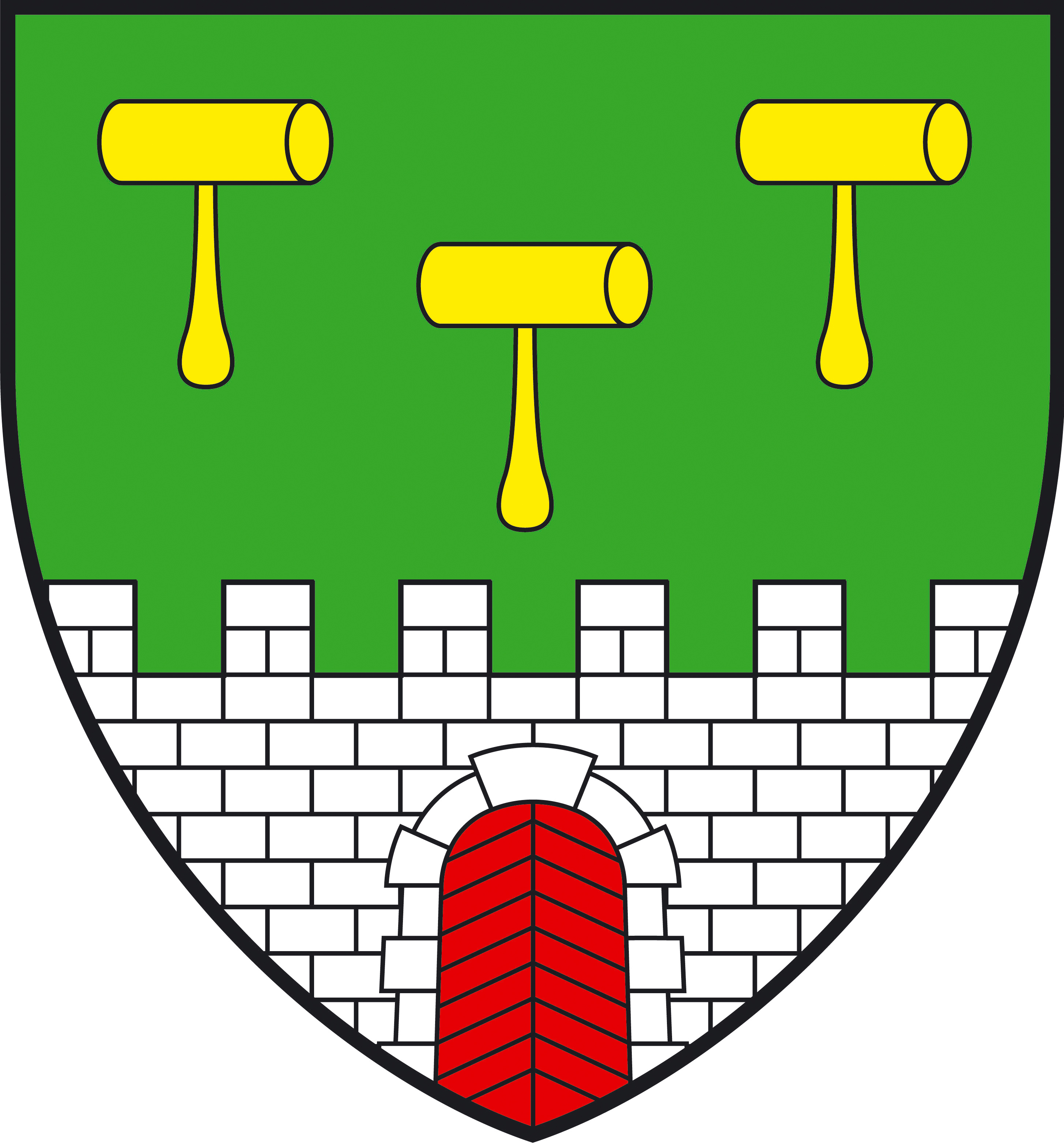 Wappen der Gemeinde Reinsberg